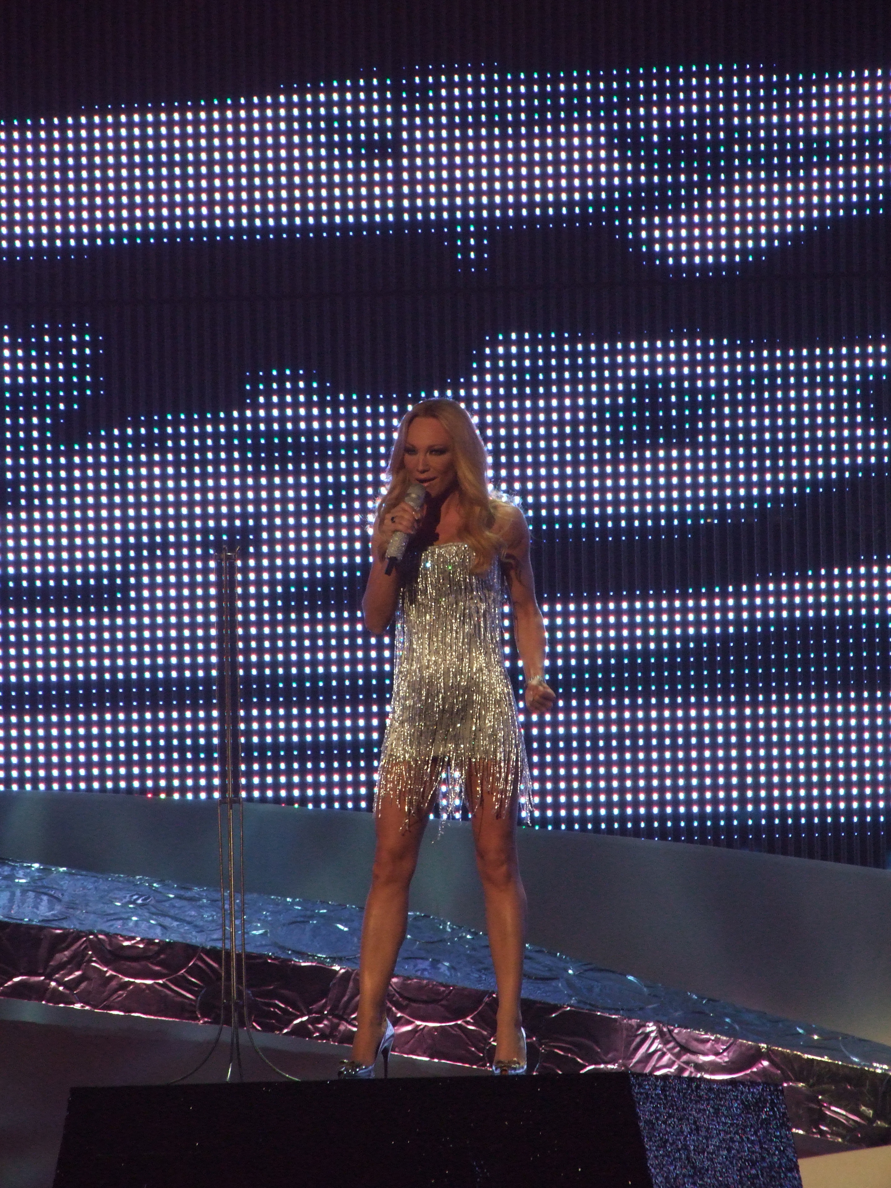 Final Eurovision 2008